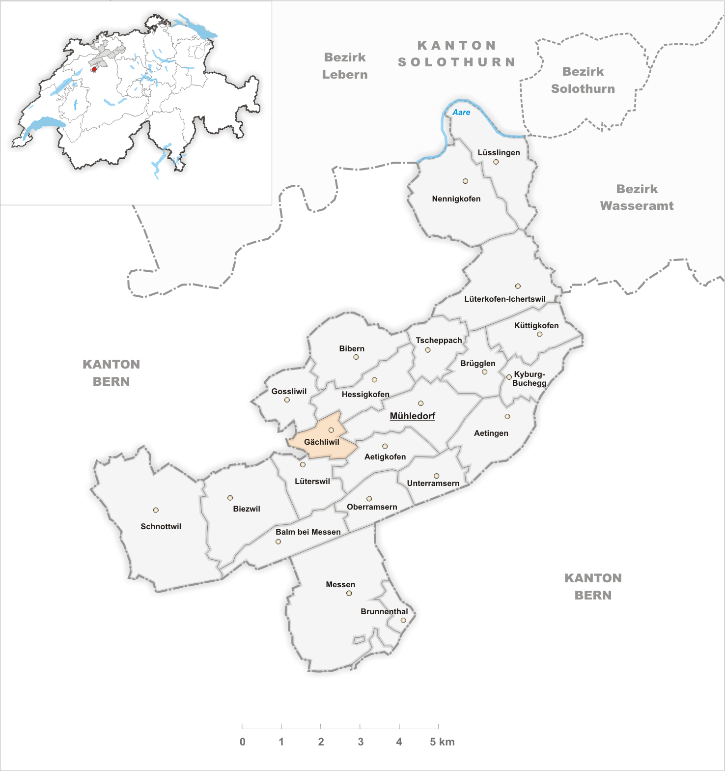 Municipality Gächliwil Artist: Tschubby